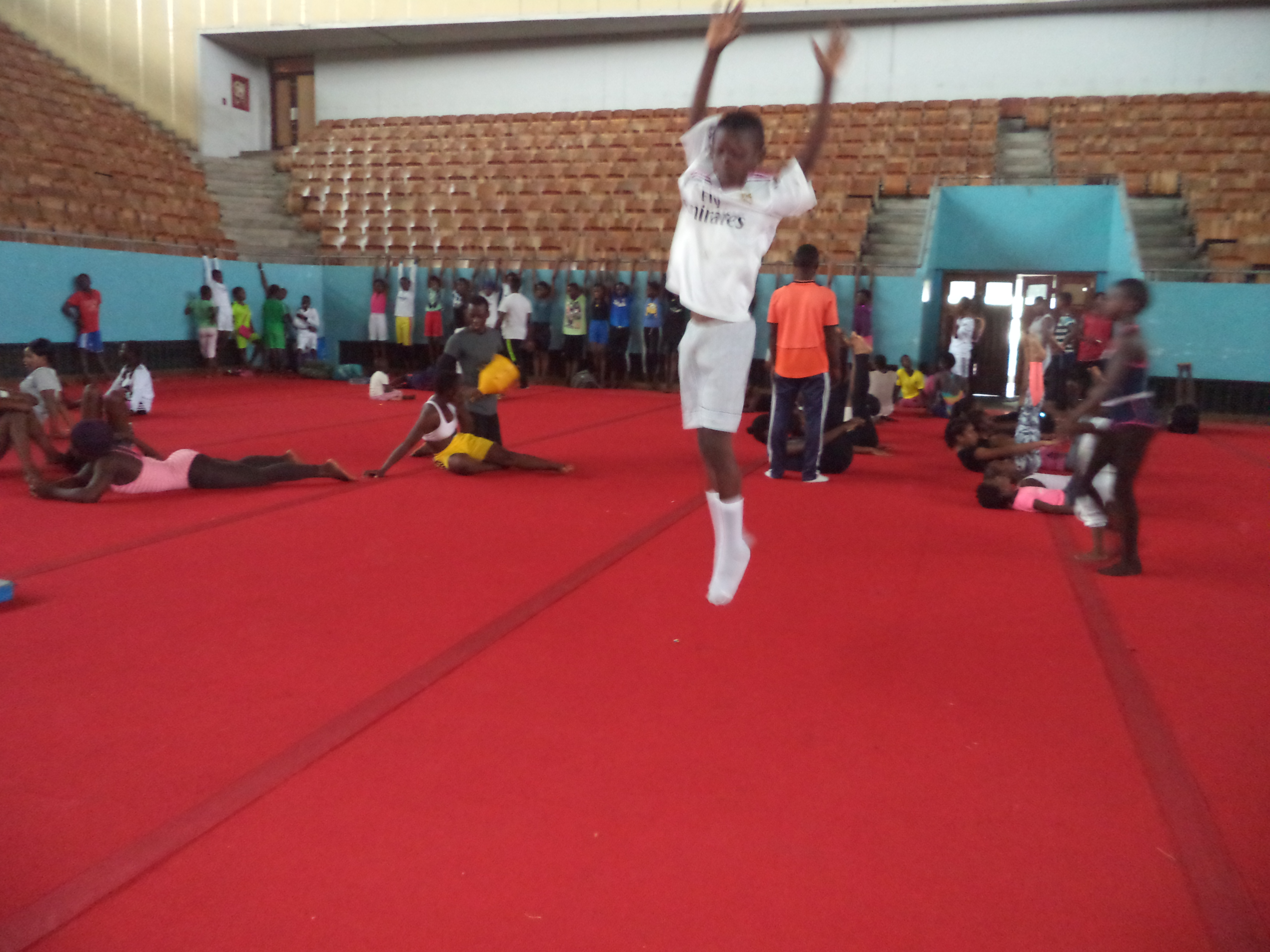 Les gymnastes béninois en séance d'entrainement au palais des sports du stade Général Mathieu KEREKOU de KOUHOUNOU